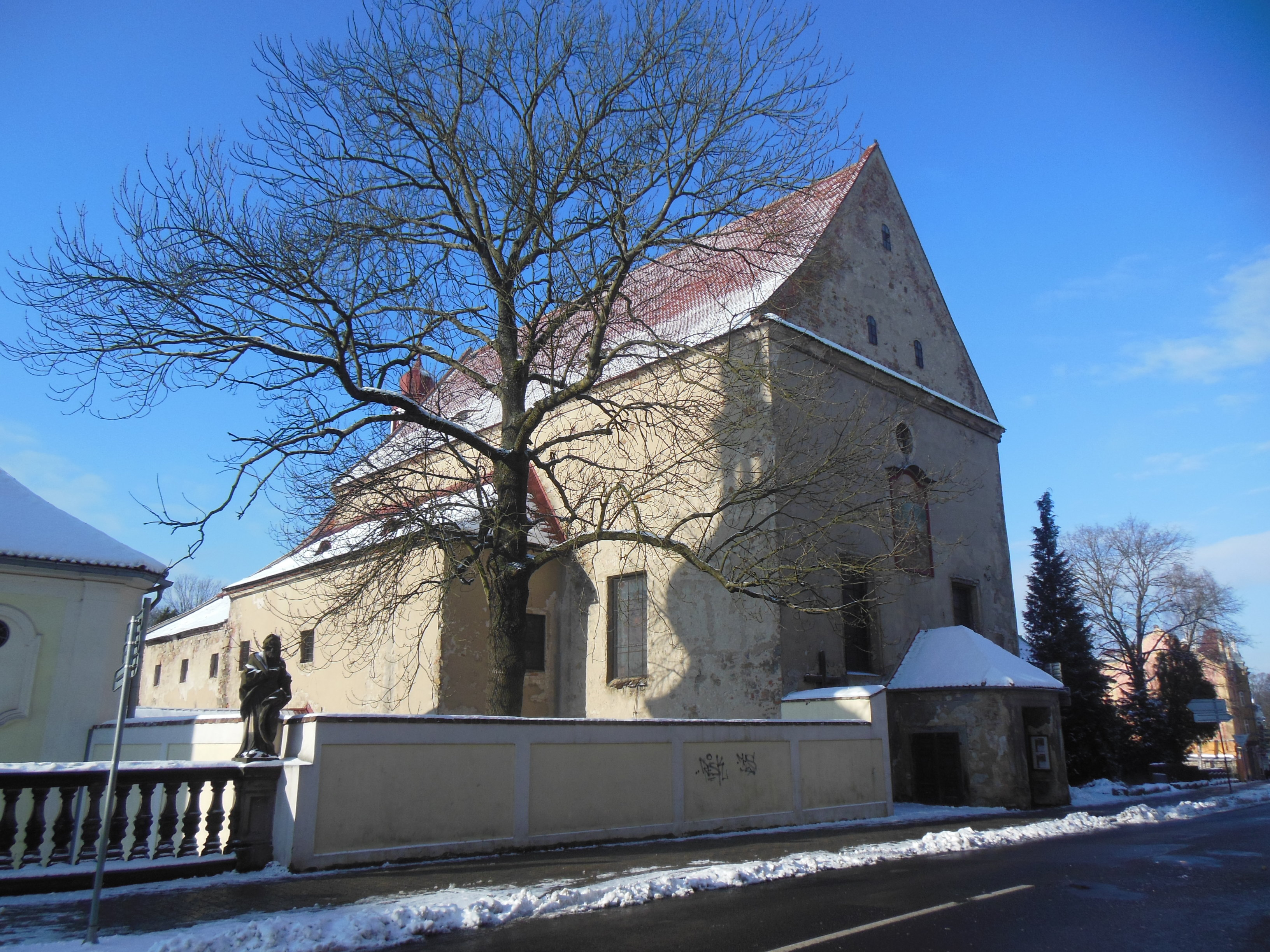 Rumburk (okres Děčín). Ulice třída 9. května, klášterní kostel svatého Vavřince.